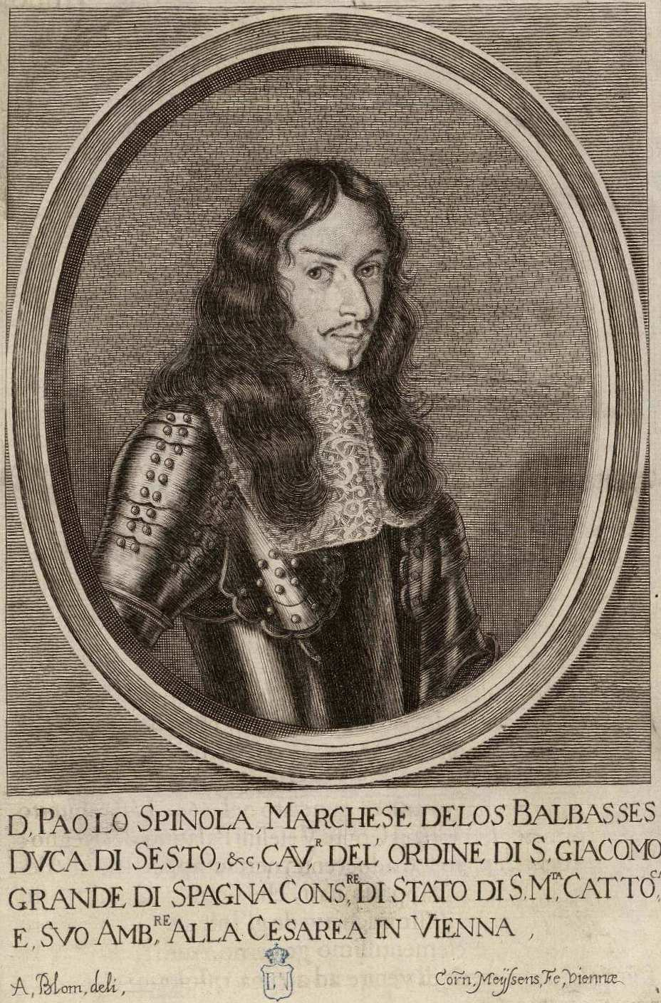 Pablo Spínola, marqués de los Balbases. Historia de Leopoldo Cesare, Viena, 1670-1674